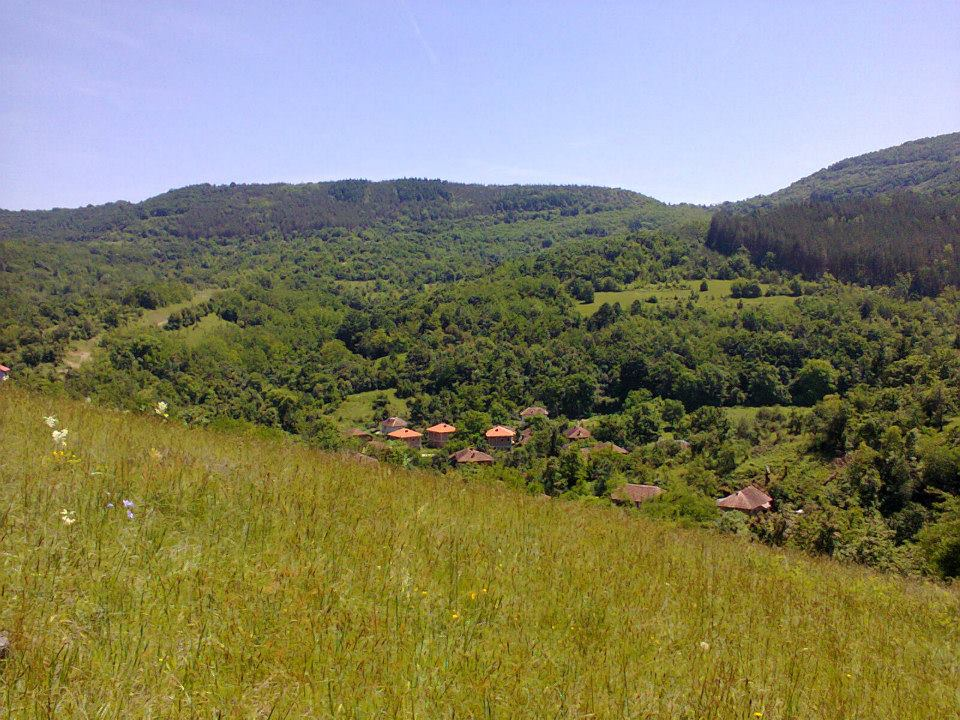 Богато биологично разнообразие